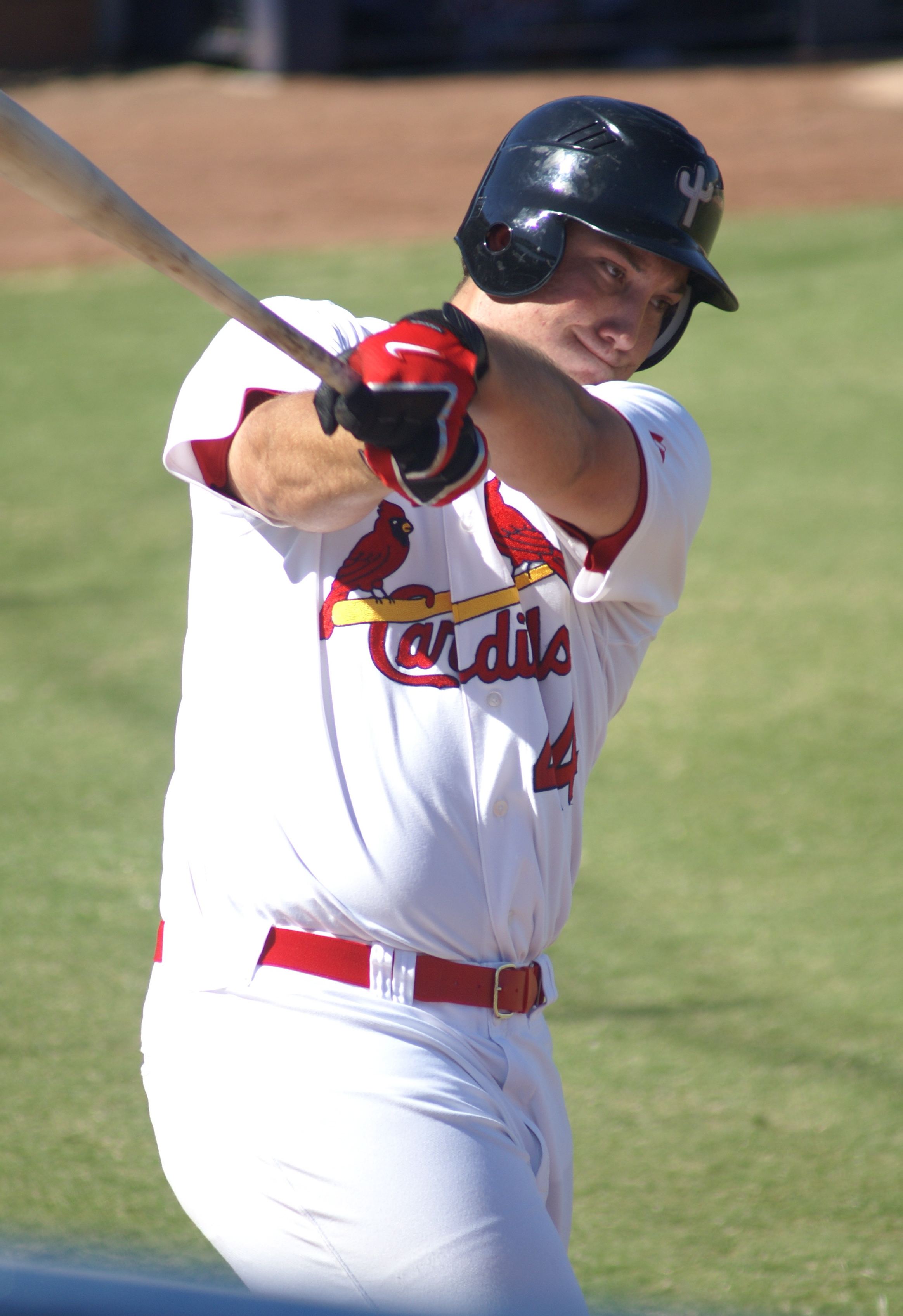 Brett Wallace